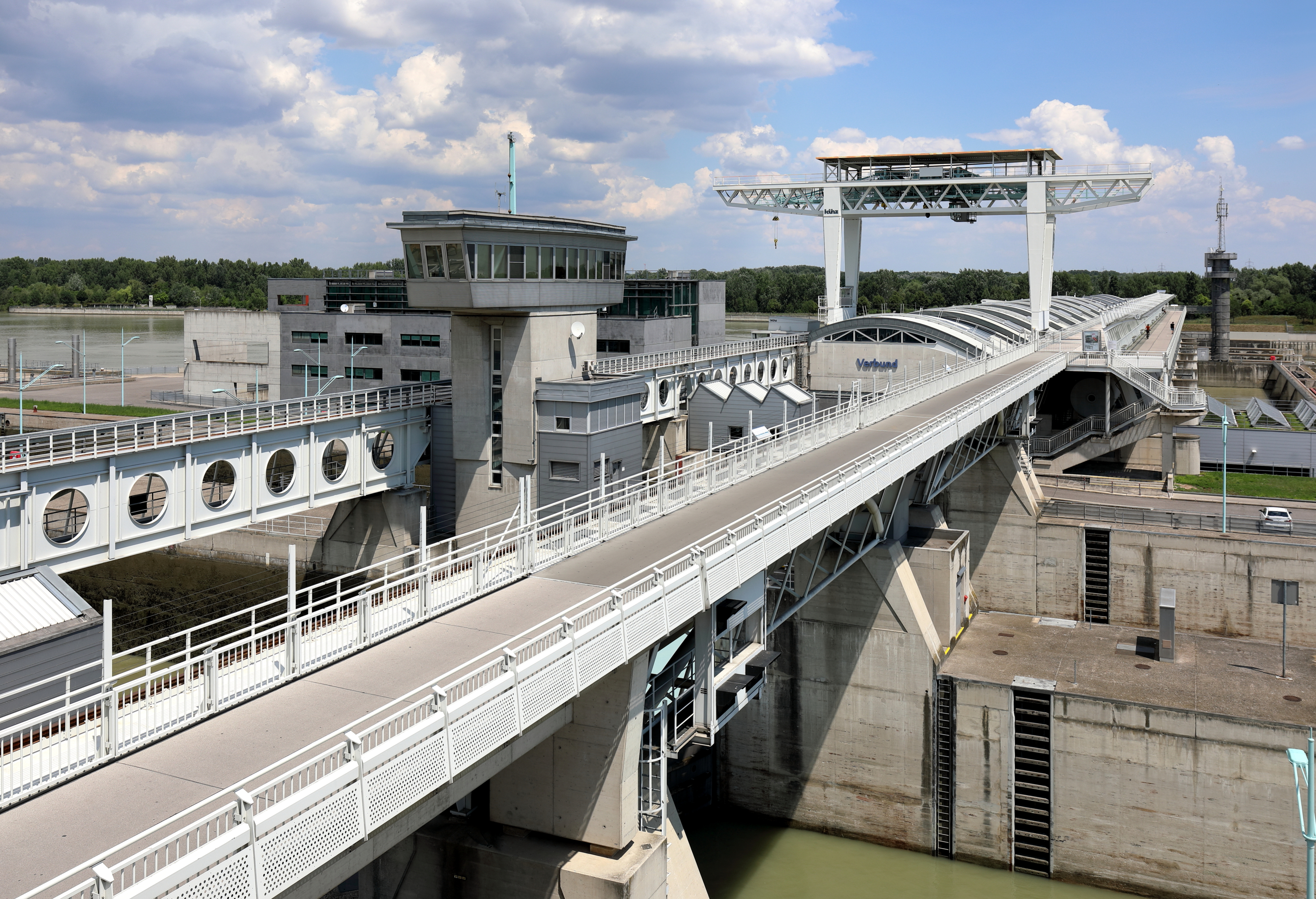 Das Donau-Kraftwerk Freudenau im 2. Wiener Bezirk Leopoldstadt mit der Schleusenanlage im Vordergrund.Nach dem positiven Ausgang einer Volksbefragung im Jahr 1991 wurde das Laufkraftwerk ab 1992 mit einem Kostenaufwand von über 15 Mrd. Schilling errichtet und 1998 in Betrieb genommen. Das zehnte und letzte der österreichischen Donaukraftwerke wurde von den Technikern der „Donaukraft“ gemeinsam mit einem interdisziplinären Team realisiert, das unter anderem aus dem Architekten Albert Wimmer, dem Wasserbauer Herwig Schwarz und den Landschaftsplanern Gottfried und Anton Hansjakob bestand.